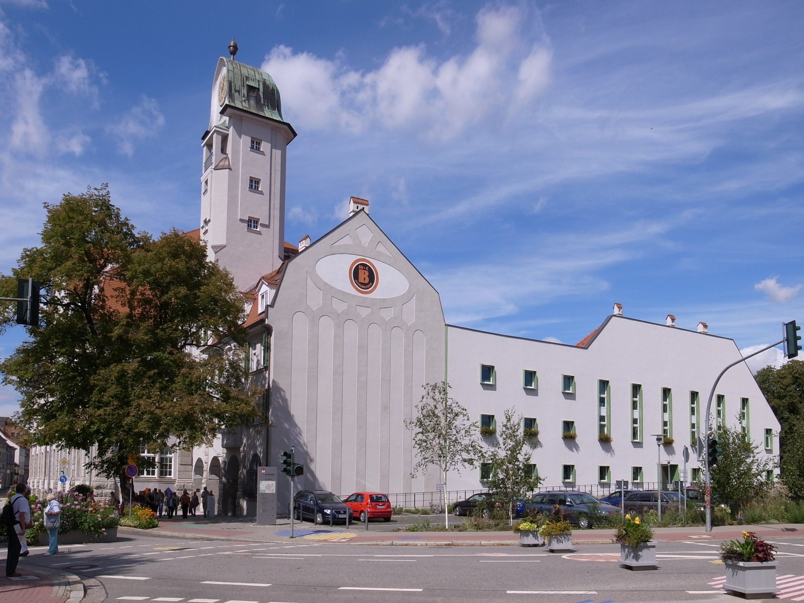 Aschersleben, Bildungszentrum/Bildungscampus Bestehornpark